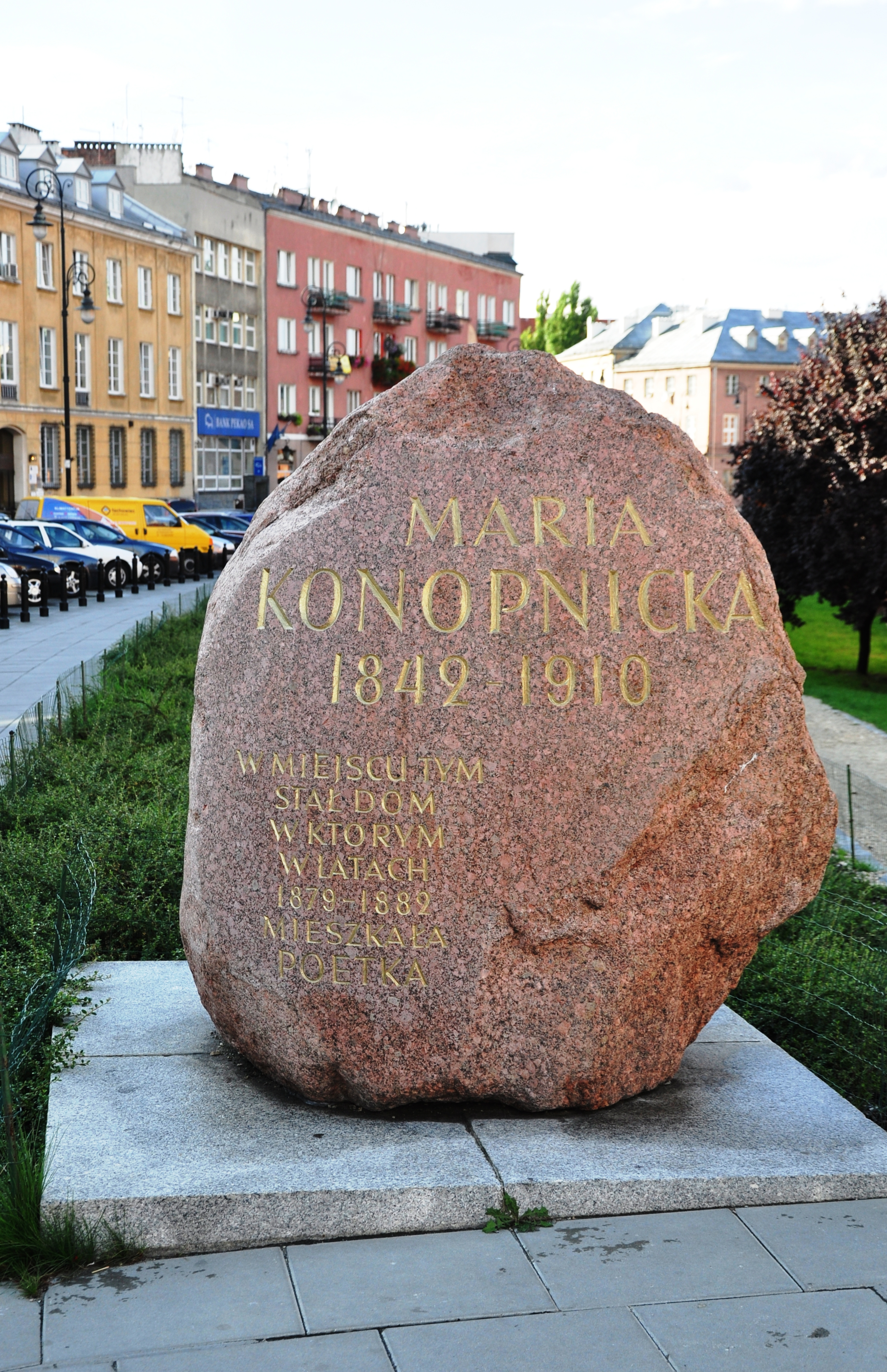 Gedenkstein Altstadtmauer Warschau